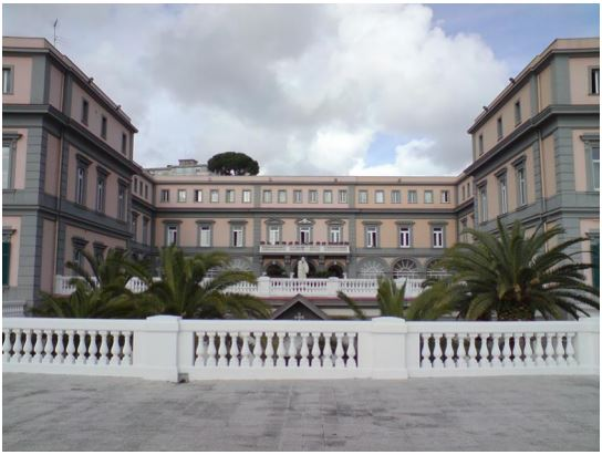 foto che inquadra la struttura del Seminario arcivescovile di Napoli